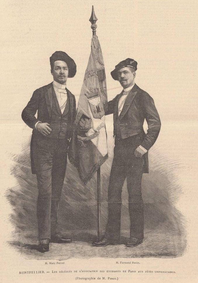 Les délégués de l'Association générale des étudiants de Paris Marc Perret et Fernand Butin aux fêtes étudiantes de Montpellier organisées pour l'inauguration de la Maison des étudiants.